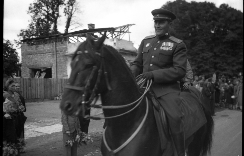 Eesti rahvuskorpuse saabumine Tallinna, korpuse komandör kv. kindral-leitnant Lembit Pärn ratsahobusel Pärnu mnt.-l.